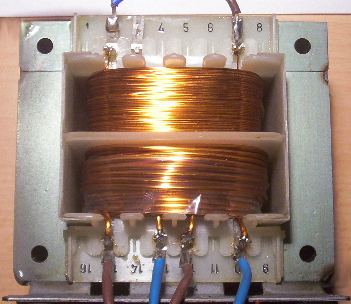 Innenleben eines 100VA-Trafos (230V auf je 2x9V). Obere Spule 230V (Primärseite), untere Spule(n) je 9V (Sekundärseite)